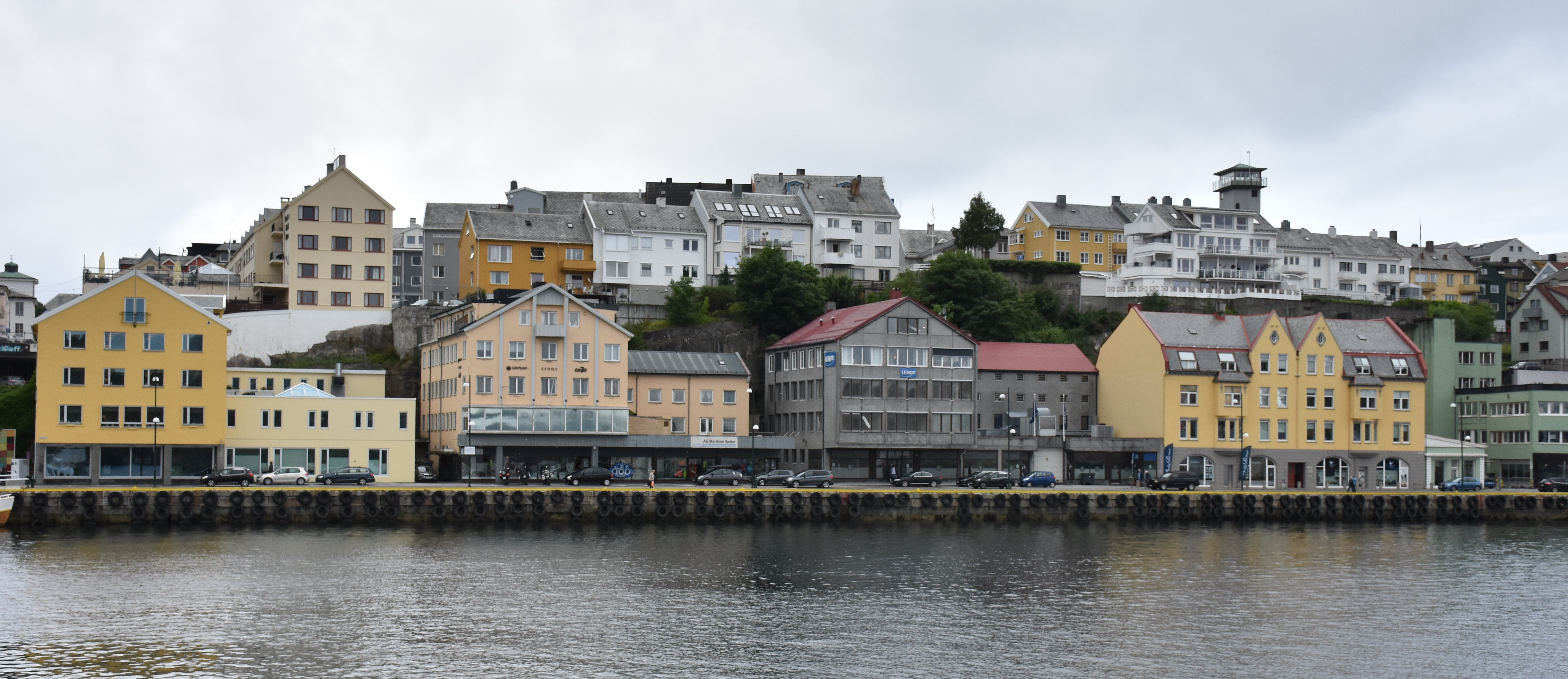 Vågeveien (riksvei 70) nord for piren i Kristiansund